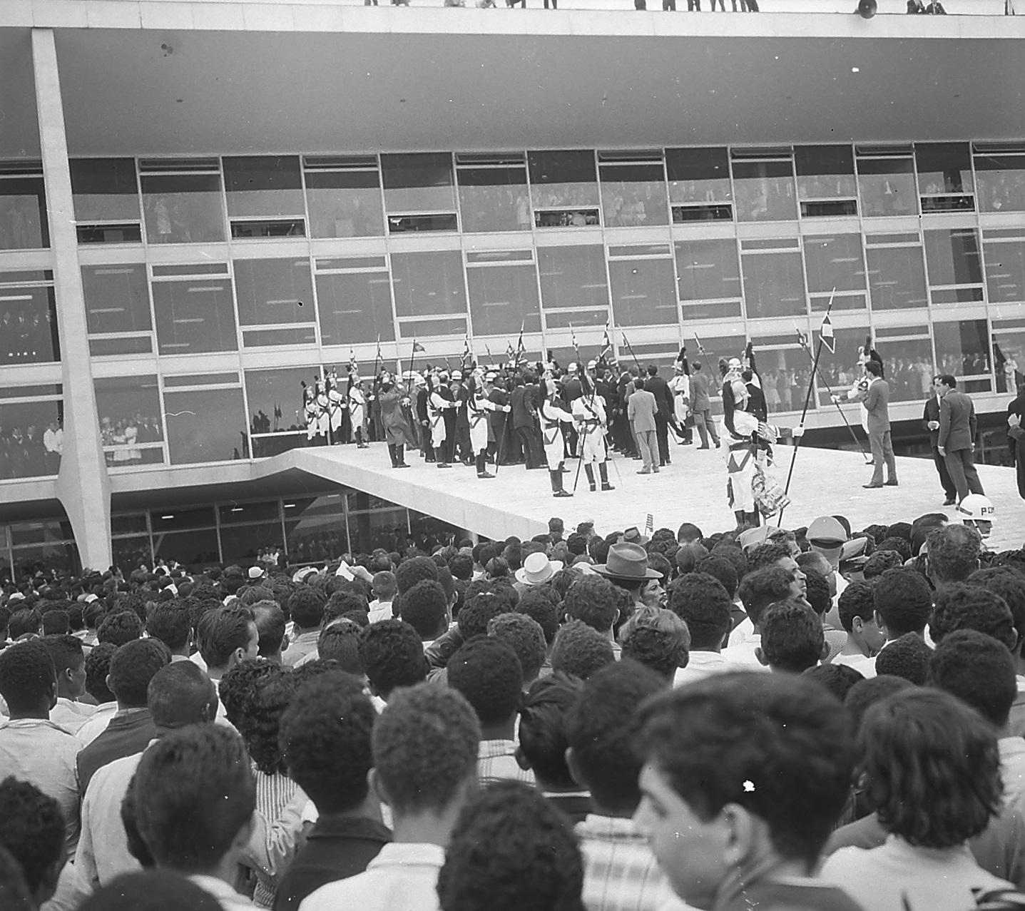 Imagem do Fundo Agência Nacional, do Arquivo Nacional